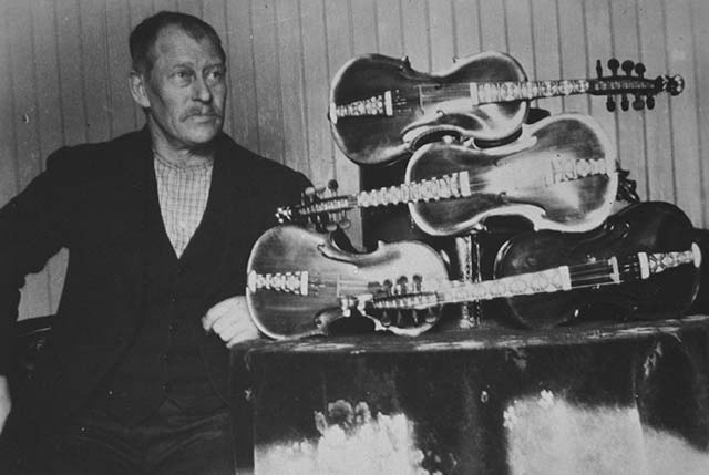 Felemaker Olav K. Venås med feler